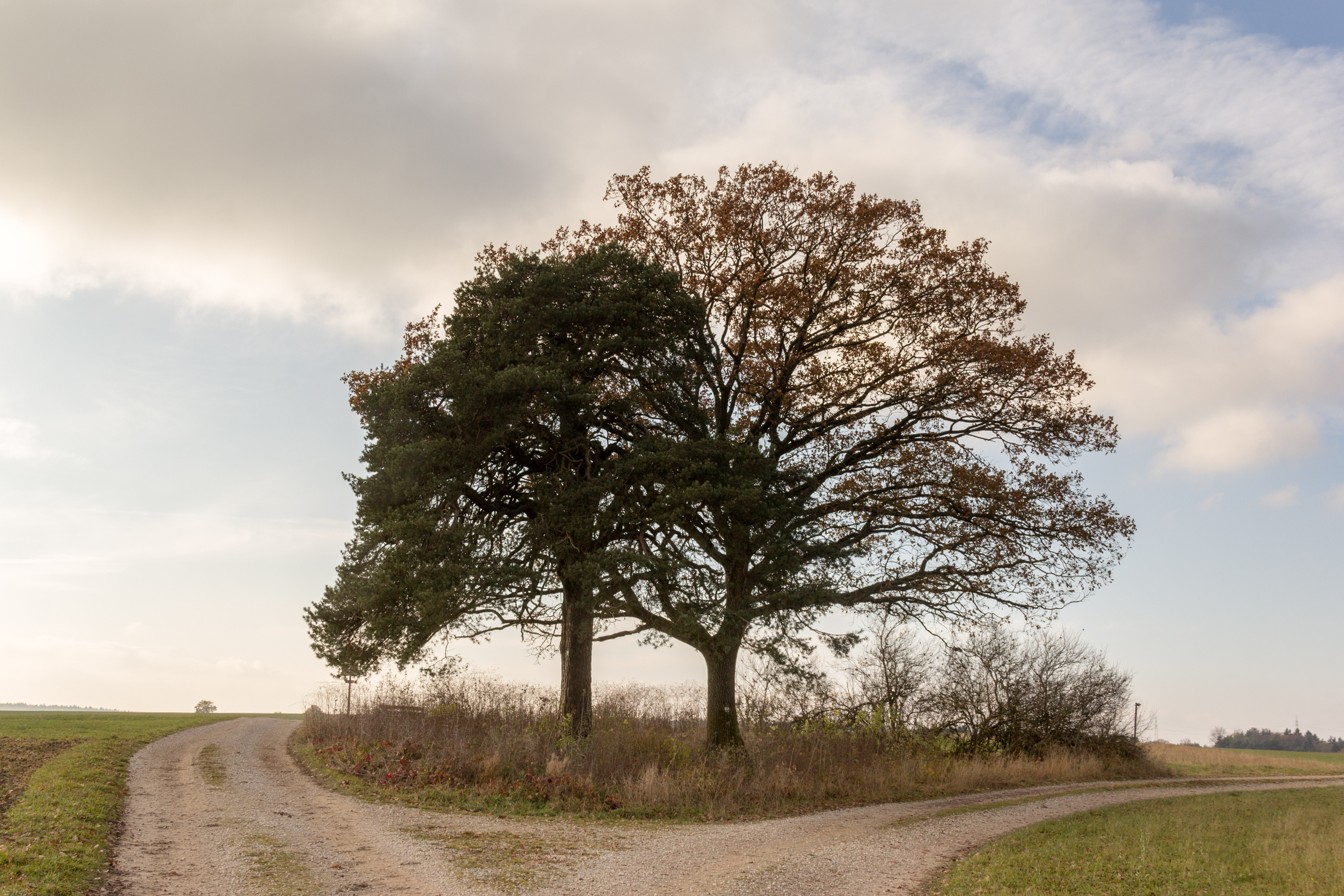 Totenbusch, Naturdenkmal, Dörlbacher Au